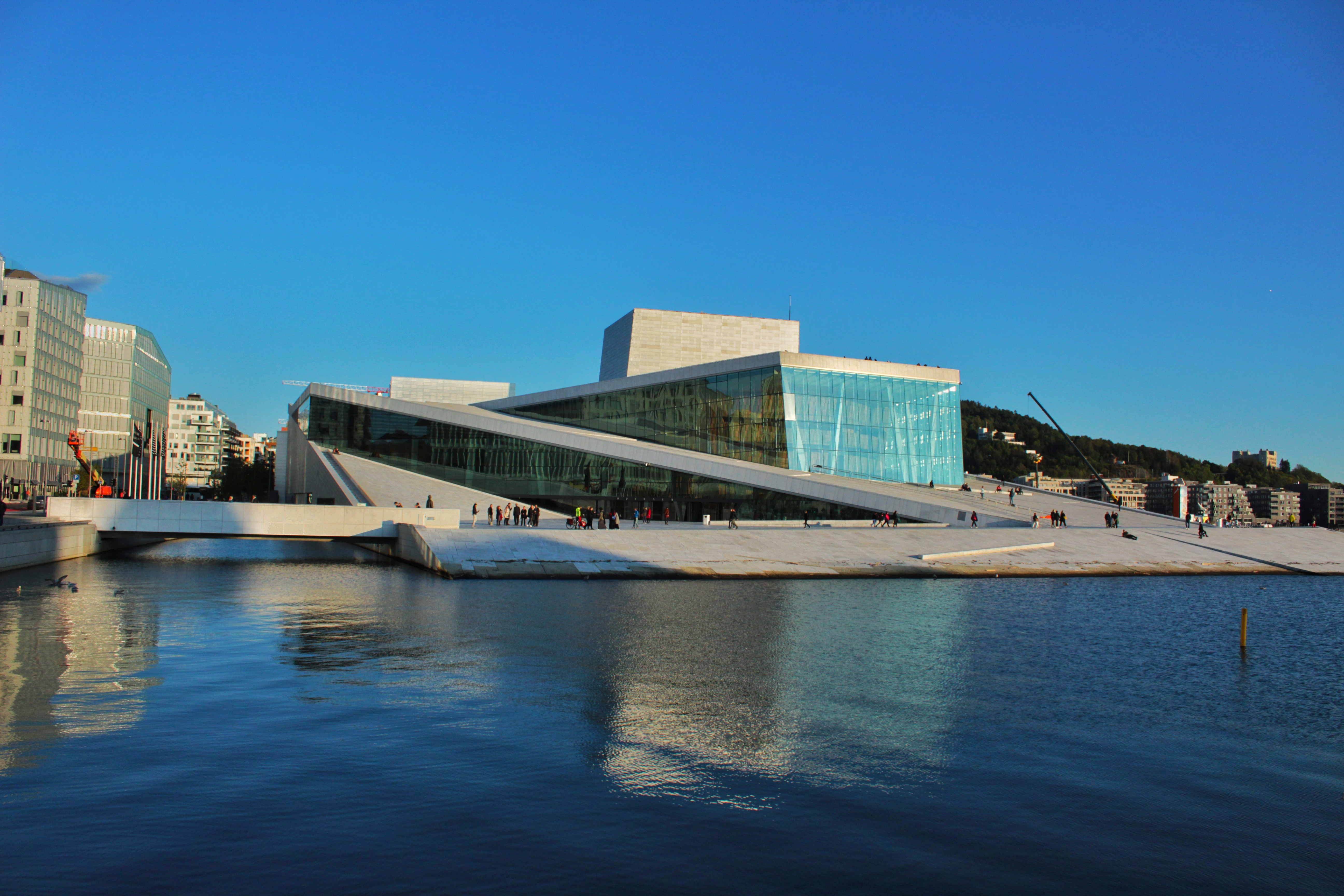 Cette photo représente une vue sur l'Opera d'Oslo